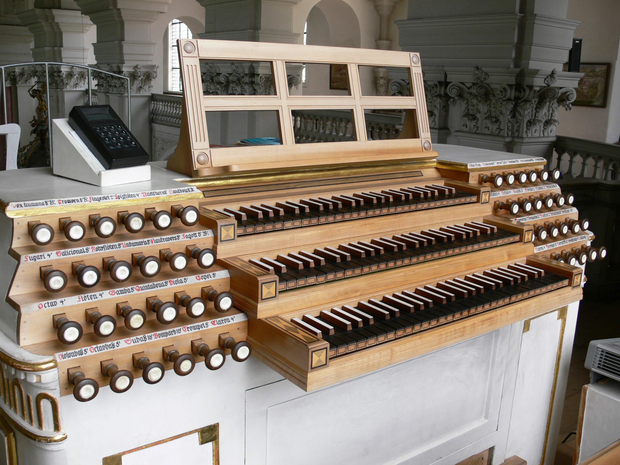 Ravensburg, ehem. Klosterkirche Weißenau, Holzhey-Orgel, Spieltisch